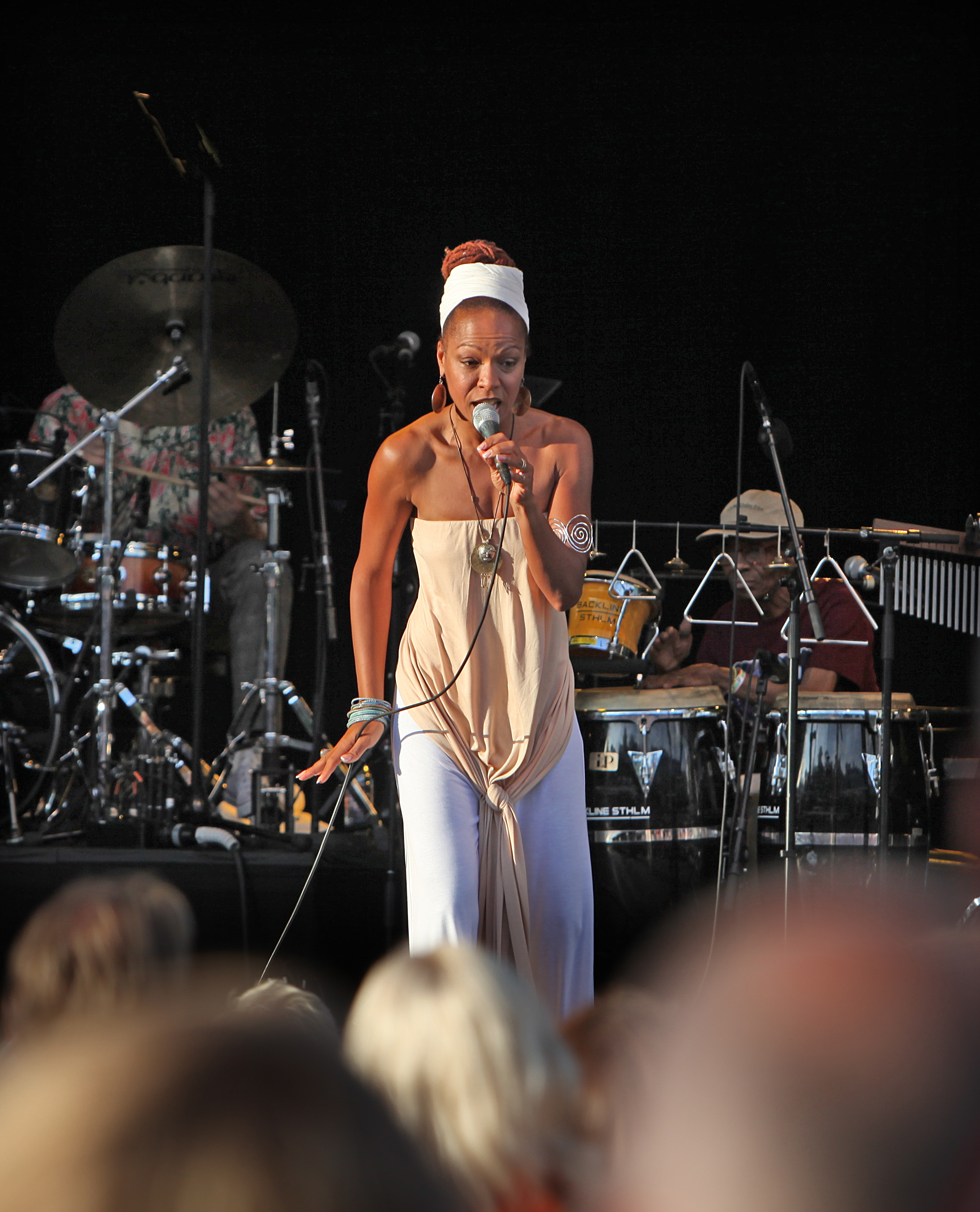 Lisa Simone, daughter to Nina Simone, at Stockholm Jazz Fest 2009.